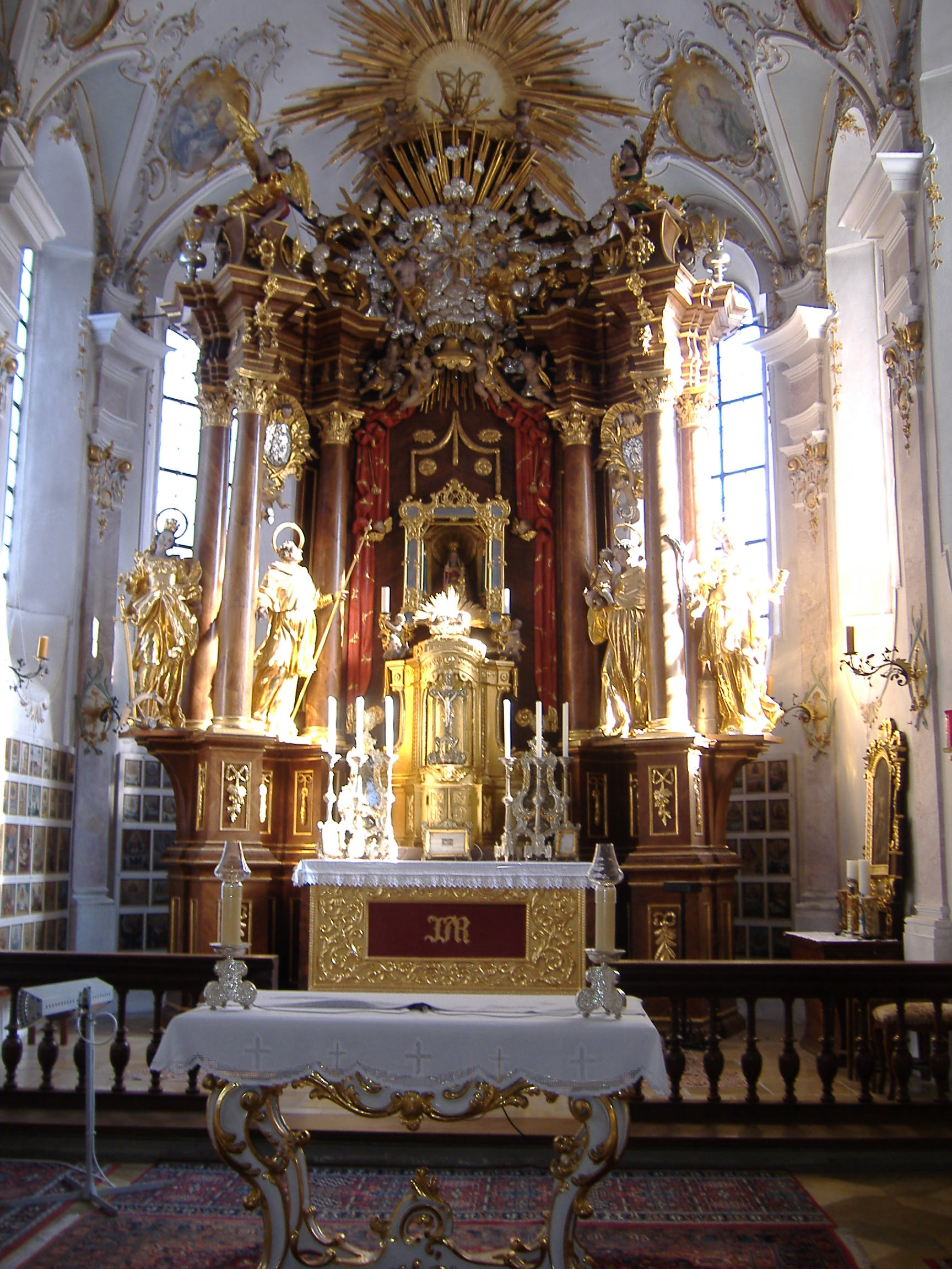 Wallfahrtskirche Buggenhofen